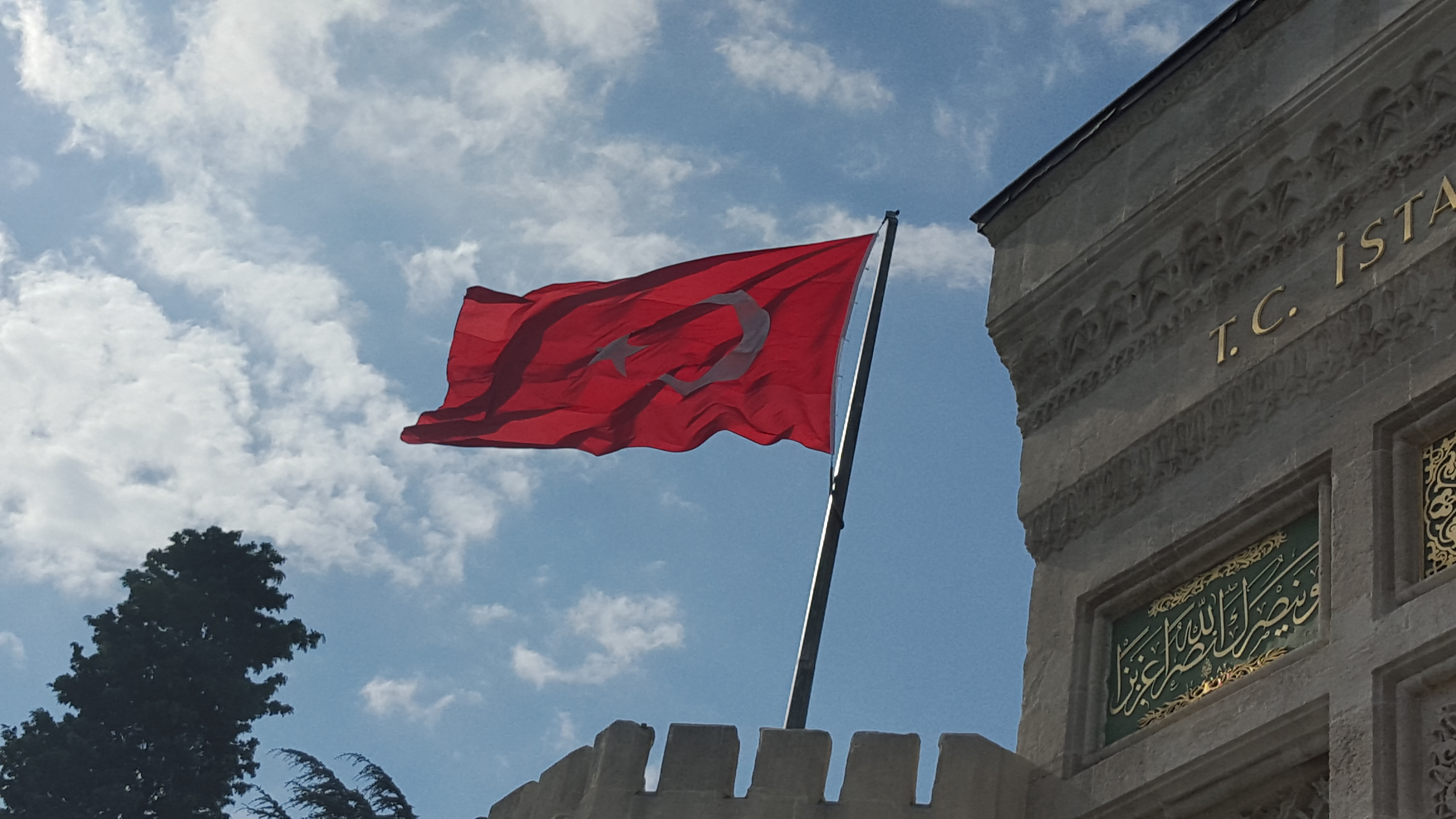 דגל טורקיה מתנוסס מעל שער הכניסה לאוניברסיטת איסטנבול